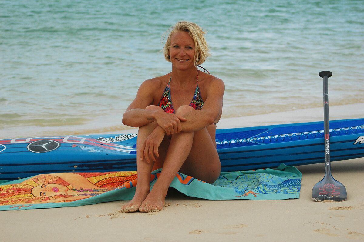 Sonni Hönscheid, Lifestyle By Jürgen Hönscheid